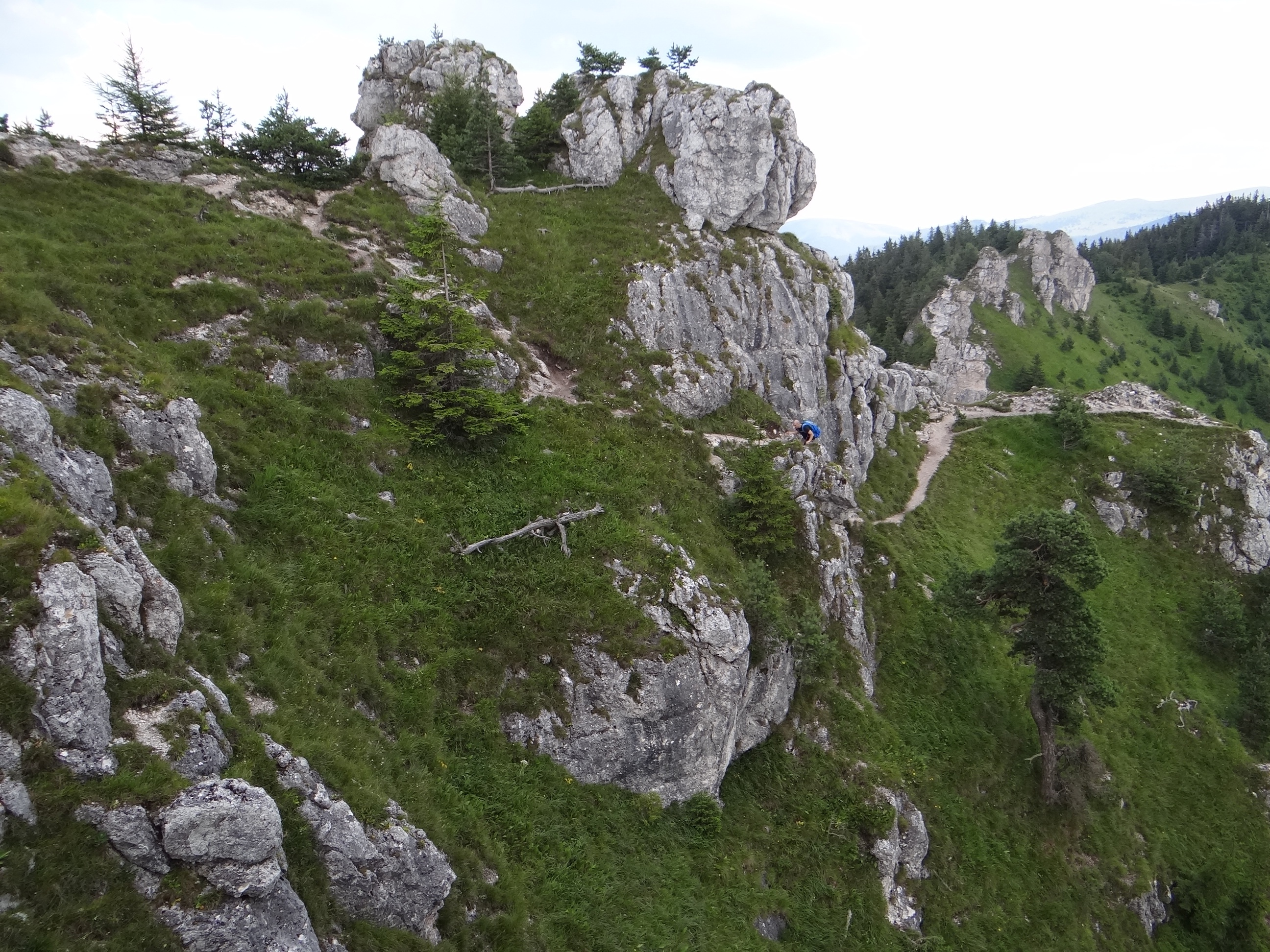 Ostrá (Veľká Fatra)